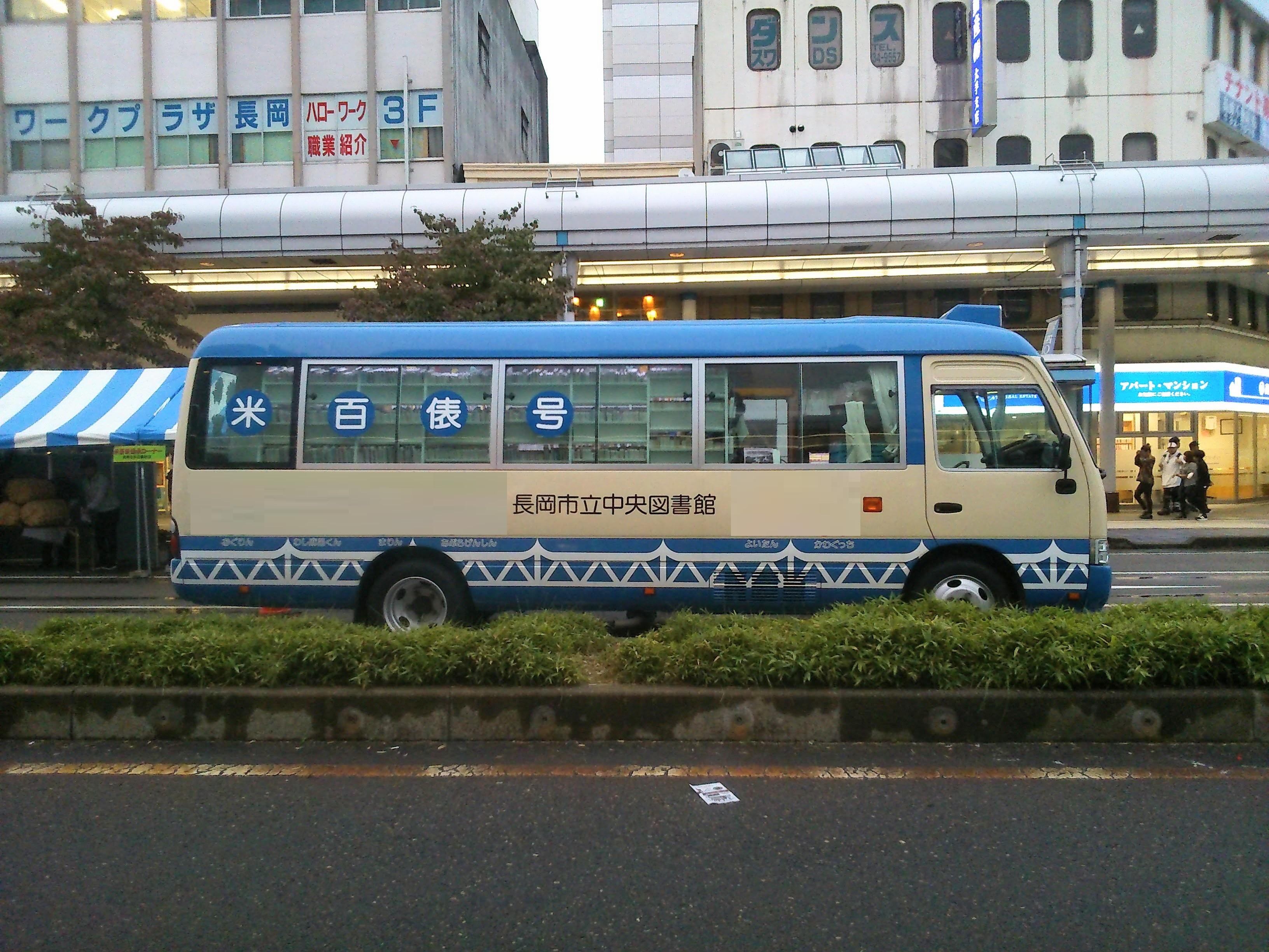 米百俵号の側面